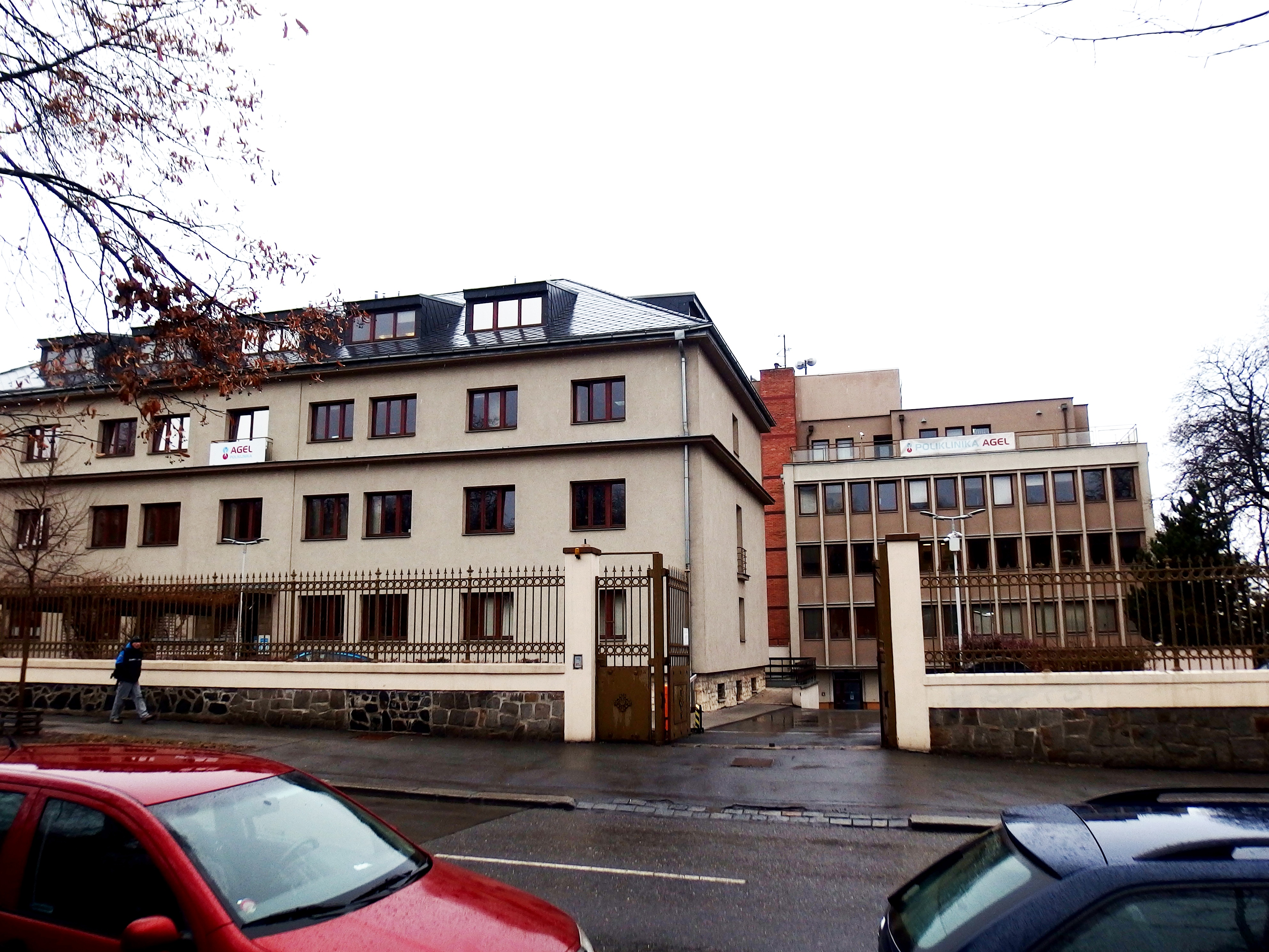 POLIKLINIKA AGEL, Italská 560/37, 120 00 Praha-Vinohrady.